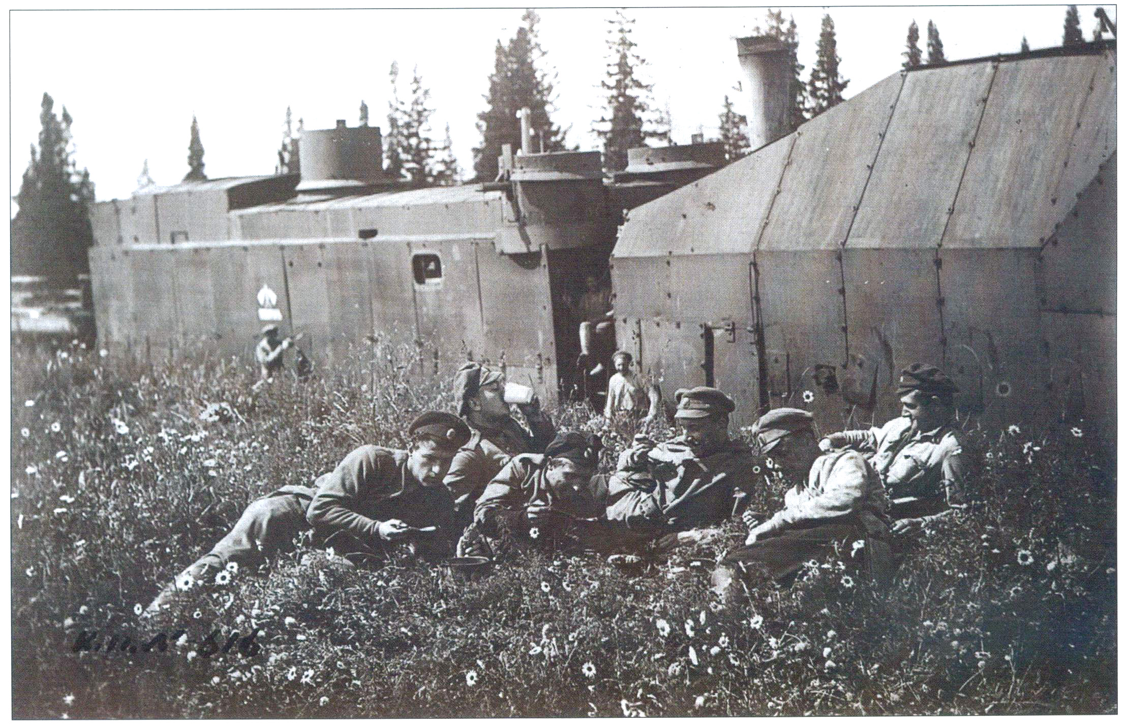 Белый бронепоезд "Сибиряк" армии Колчака. Команда на отдыхе. Лето 1919. Пропагандистская фотография Худ. отдела.